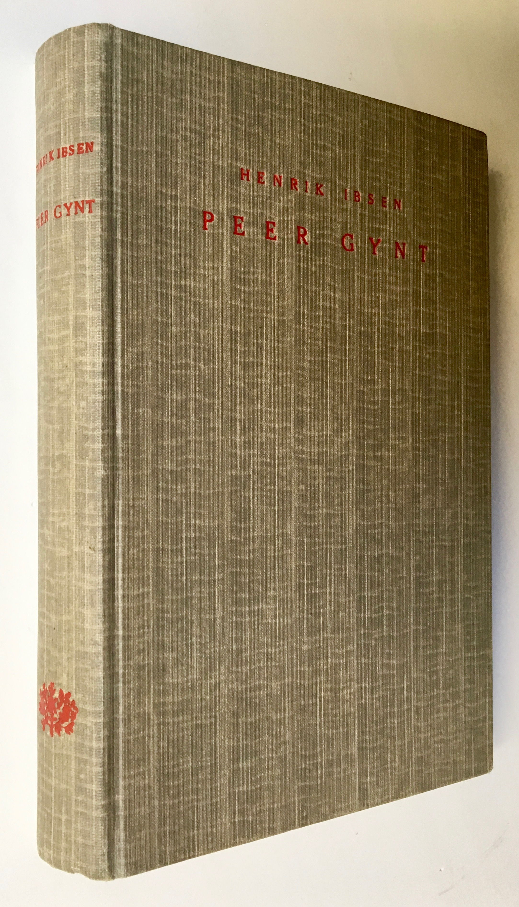 Taska köide